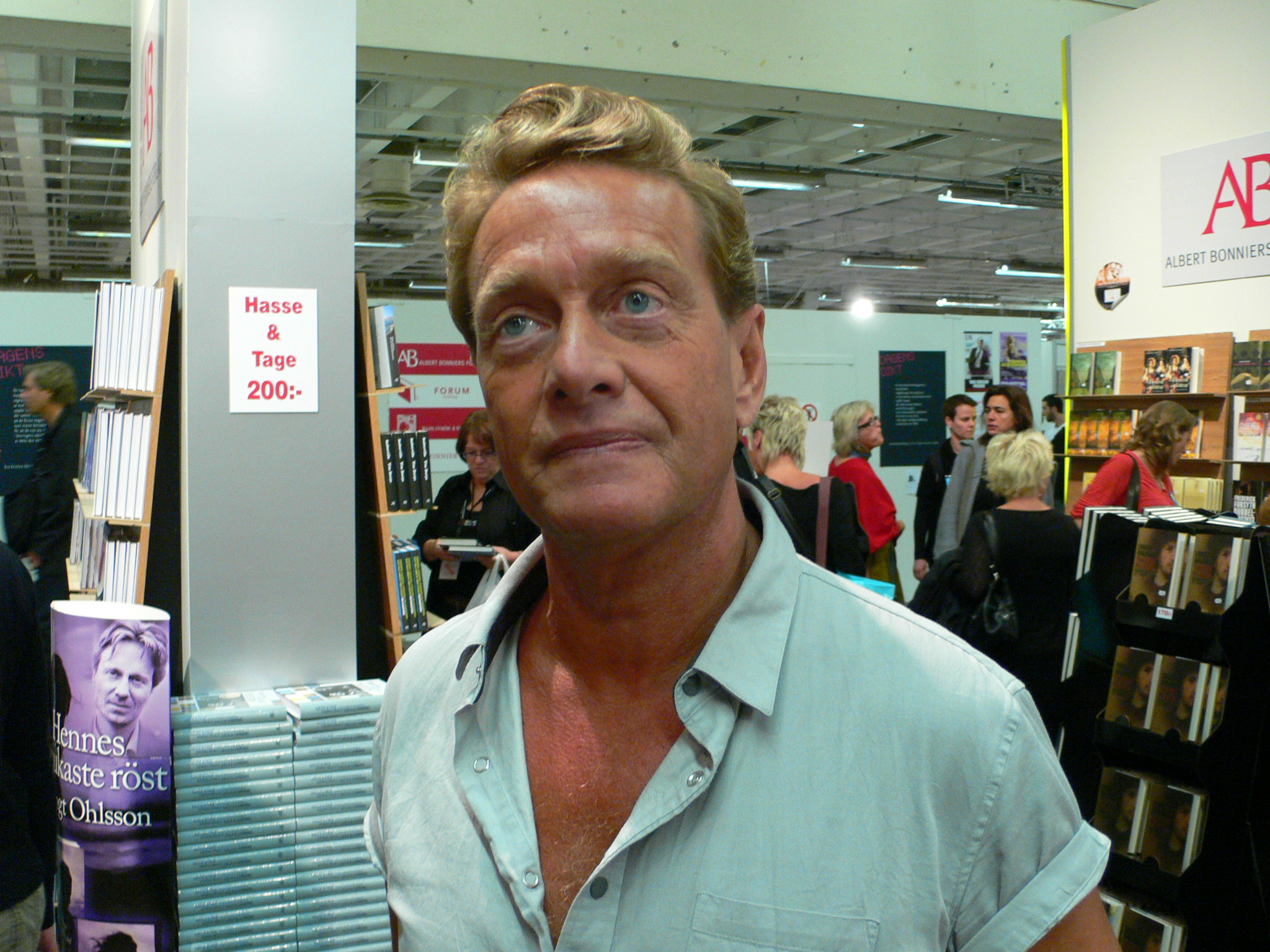 Björn Ranelid on Gothenburg Book Fair 2007, Björn Ranelid på Bok- och biblioteksmässan 2007